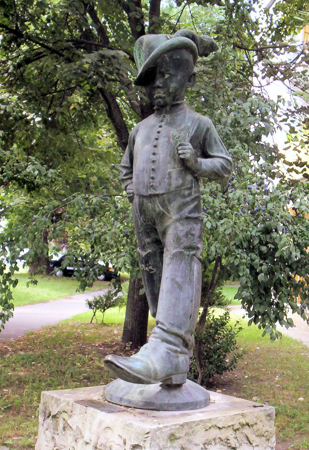 Hüvelyk Matyi szobra Baján (Telcs Ede alkotása) – photo taken by uploader User:Csanády in 2006.